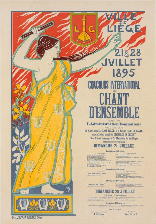 Affiche pour un concours d'orphéons à Liège.